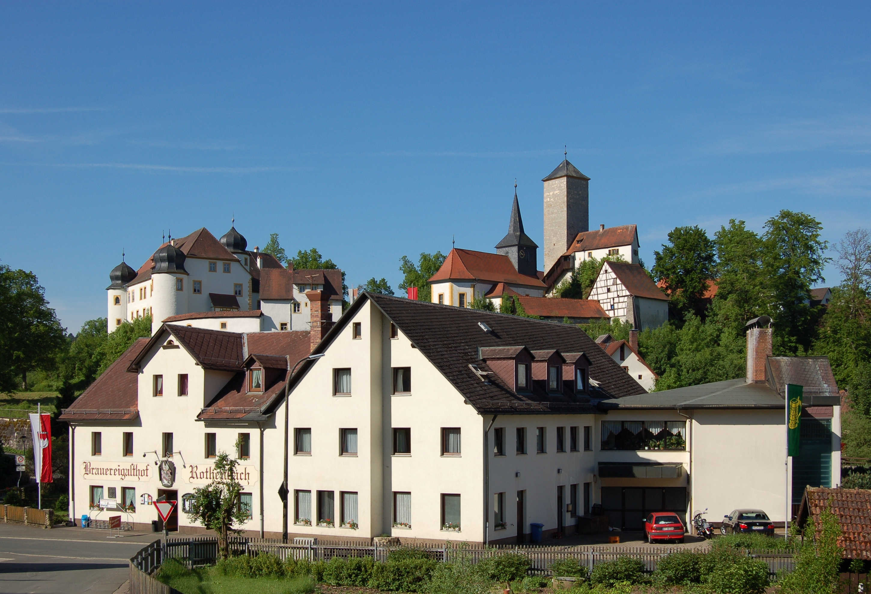 Das denkmalgeschützte Schloss Unteraufseß